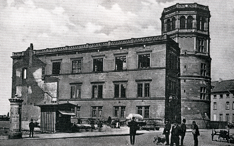 Düsseldorfer-Schloss-Ruine um 1900